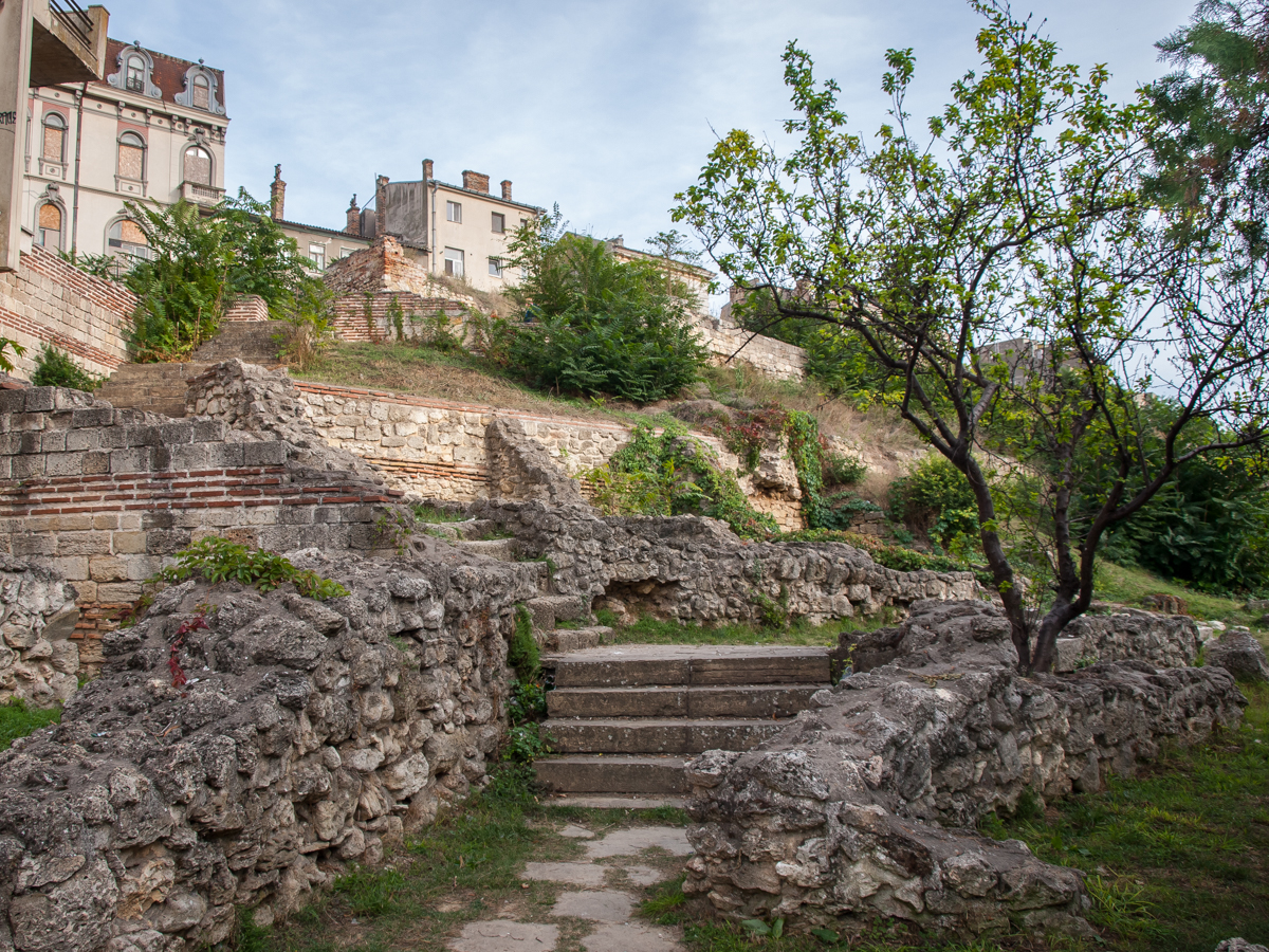 Situl arheologic „Orașul antic Tomis”